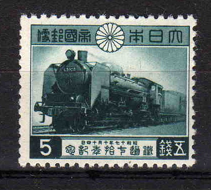 japanese stamp（日本の記念切手）日本の鉄道開業70周年記念切手である。描かれているのはC59蒸気機関車